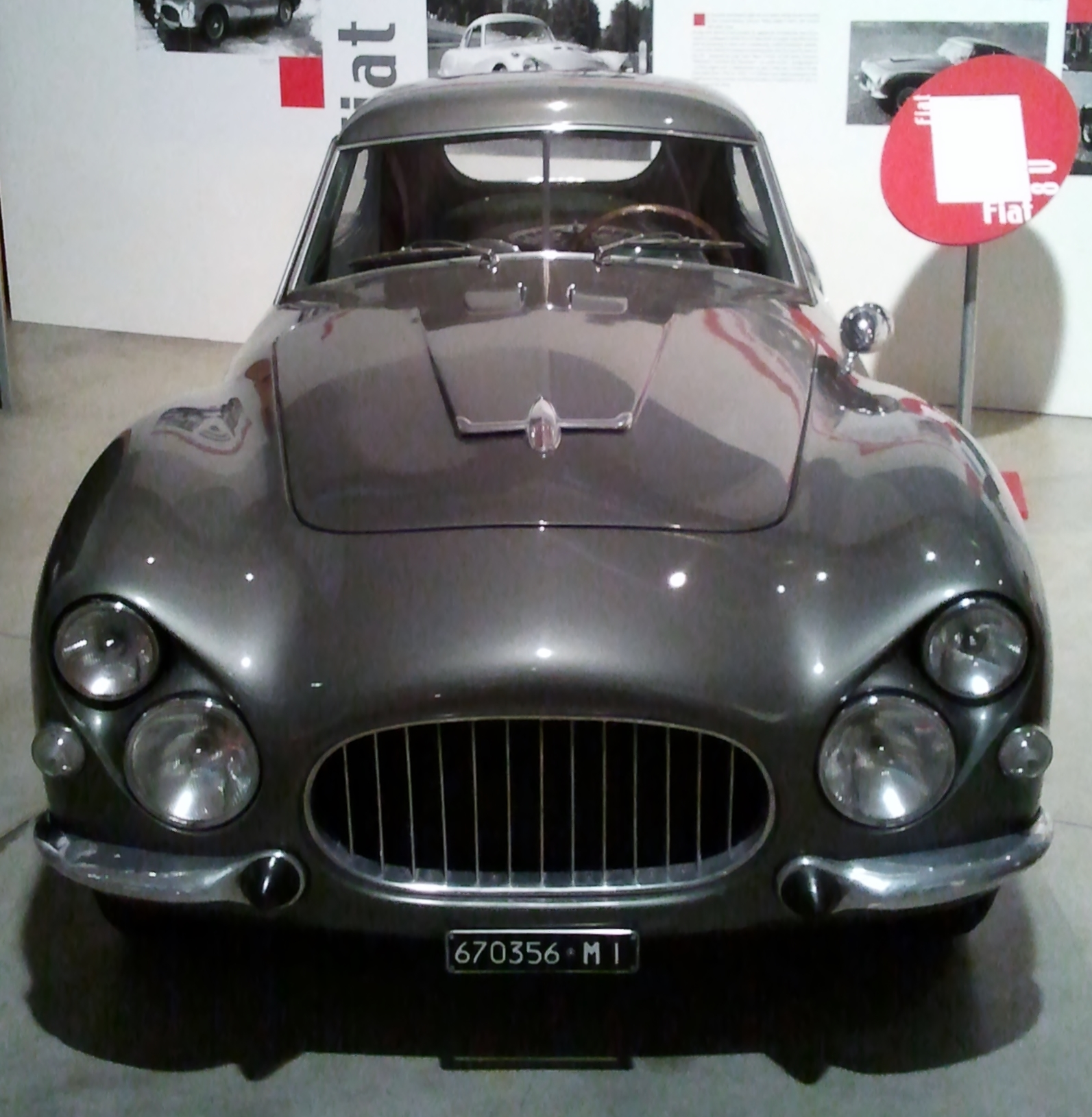 Fiat 8V en el Centro Storico Fiat